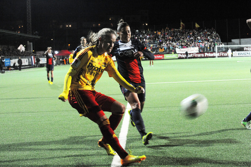 a_71_7018